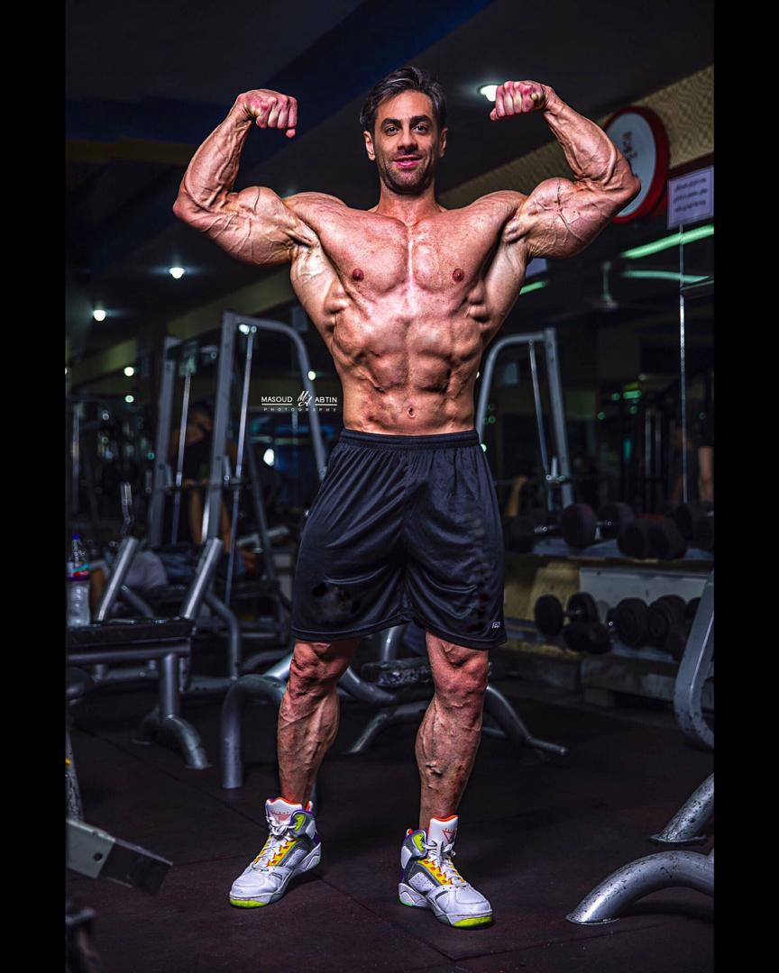 عکس شهاب مرادی دهقی